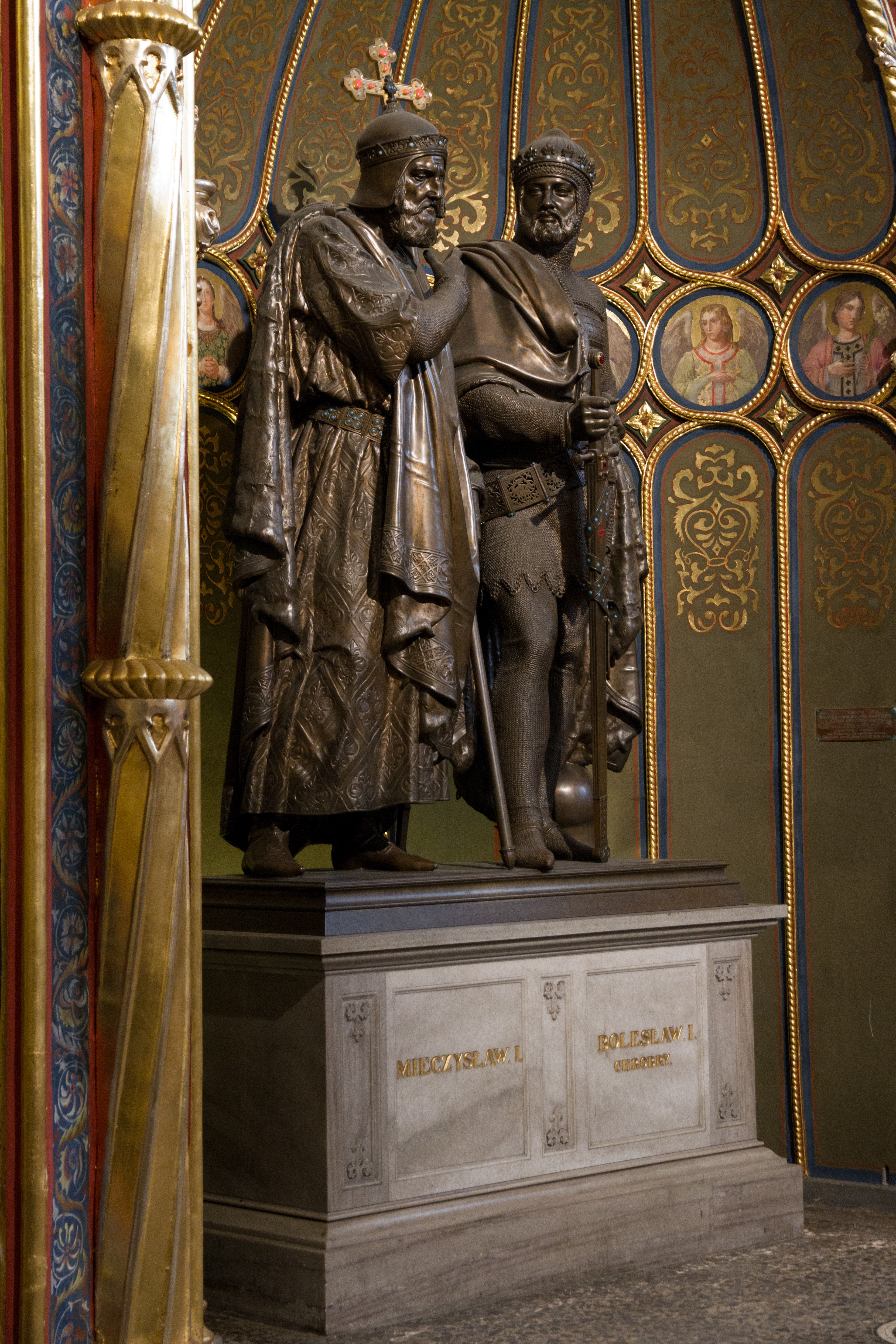 Poznań, Katedra pw. śś. Apostołów Piotra i Pawła, wnętrze